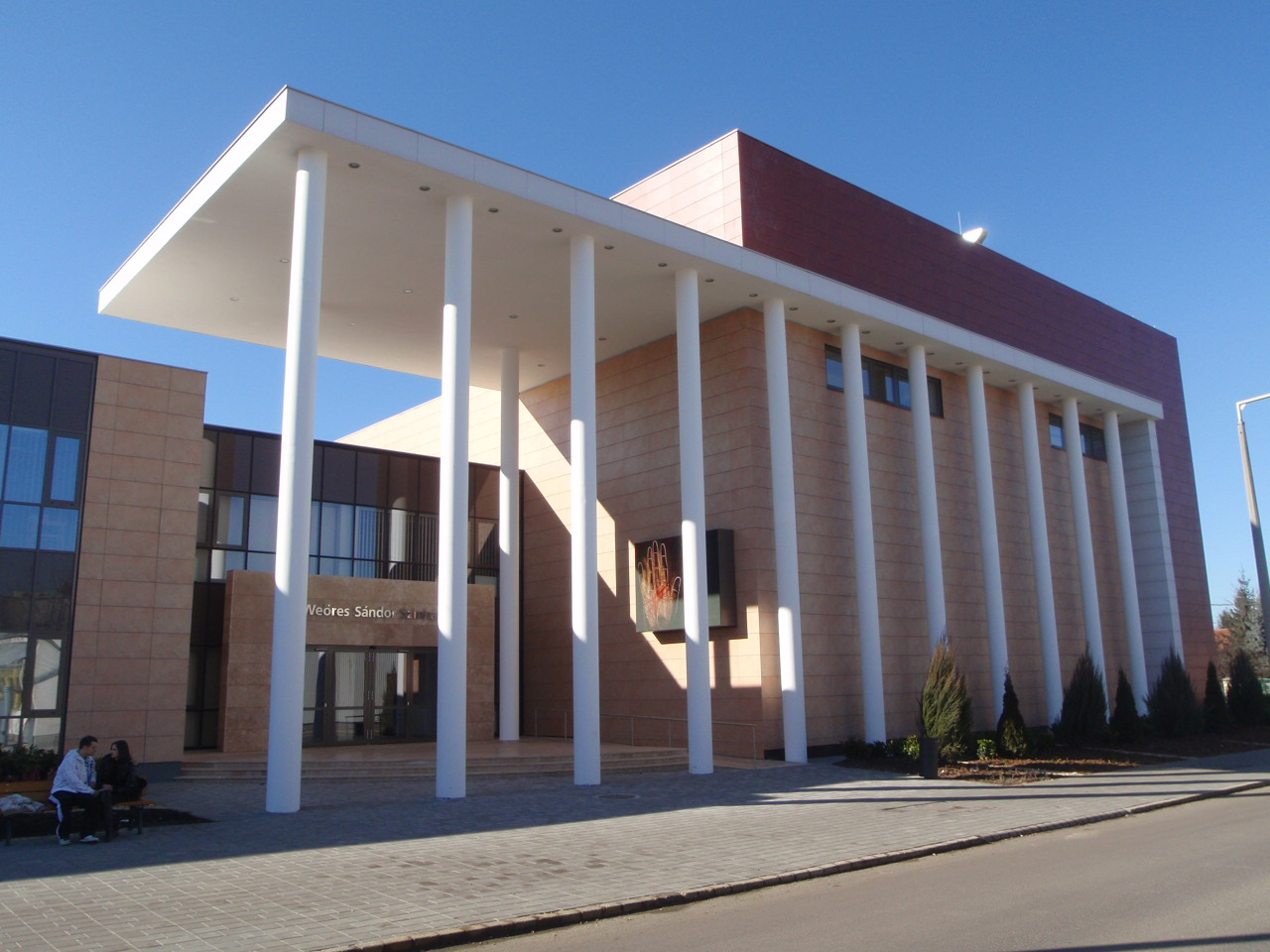 Sandor Weöres Stadttheather Steinamanger